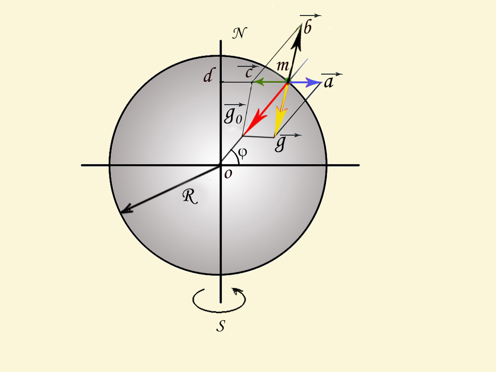 Силы на вращающейся Земле